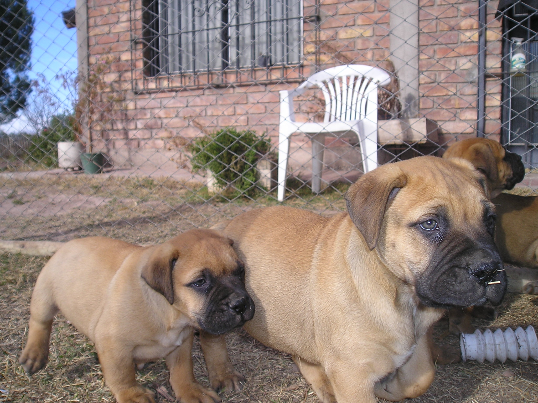 Young Bullmastiffs, taken by Diego Di Giacomo, Coquimbito, Mendoza, Argentina